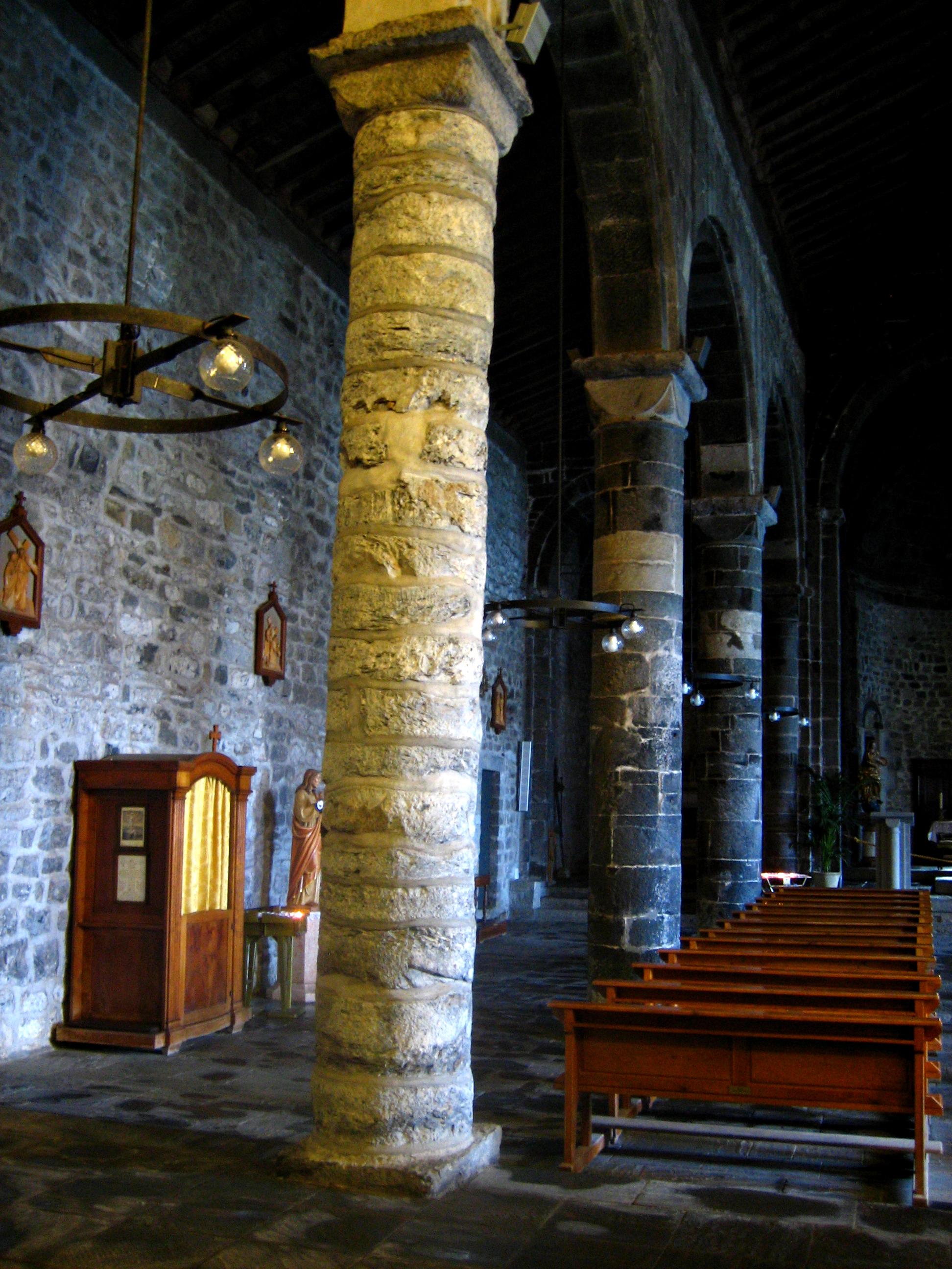 Vernazza, Liguria, Italia